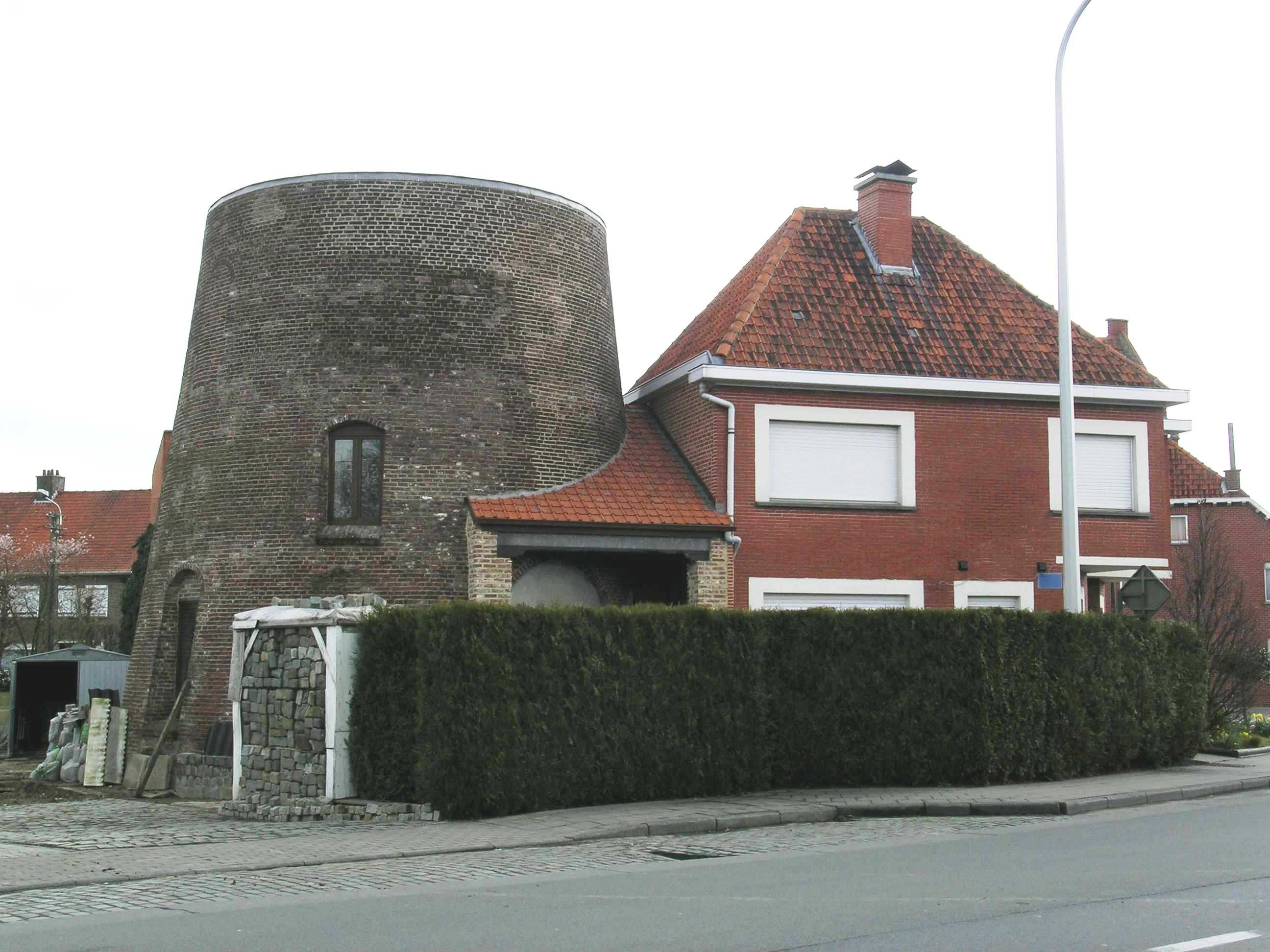 deken darraslaan 83